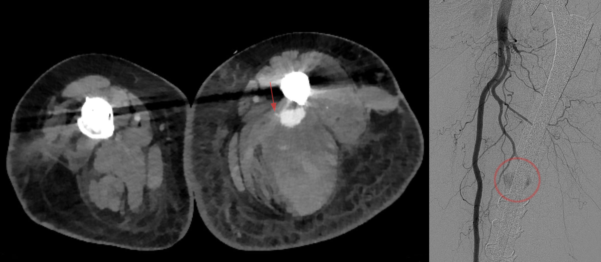 Aneurysma spurium der A. profunda femoris links nach komplexer Revisionsoperation einer Hüftendoprothese. Links Computertomographie: Das kleine Feeder-Gefäß (Pfeil) ließ sich nach oben als Ast der A. profuna femoris identifizieren. Man sieht neben dem lokalen kontrastierten Blutaustritt eine große Einblutung vor allem in die ischiocrurale Muskulatur. Rechts primäre Darstellung in der DSA nach Cross-over-Sondierung: Der Kontrastmittelaustritt ist vom Prothesenschaft partiell überdeckt.